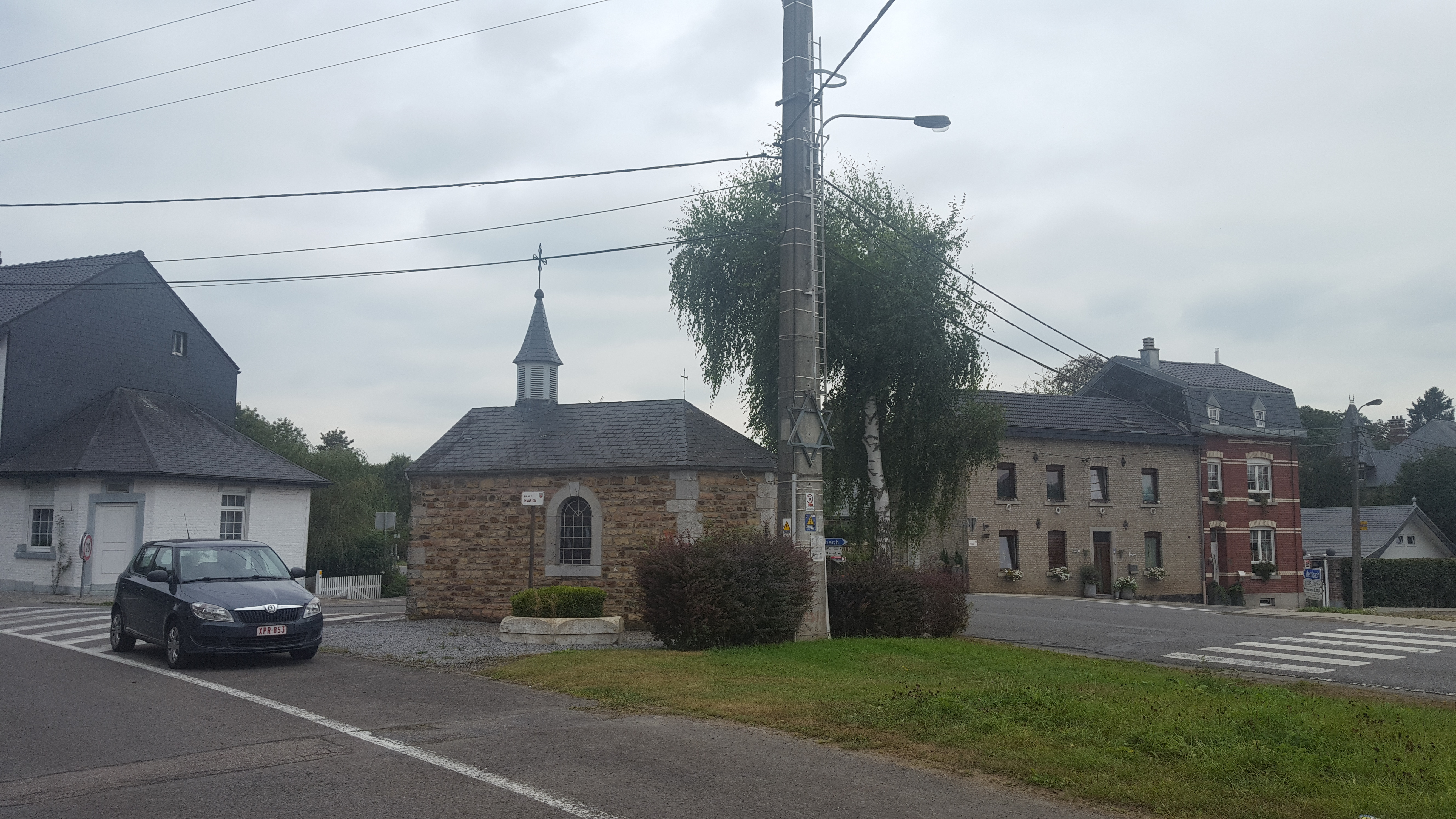 Chapelle St Quirin, Membach, Baelen, Belgique